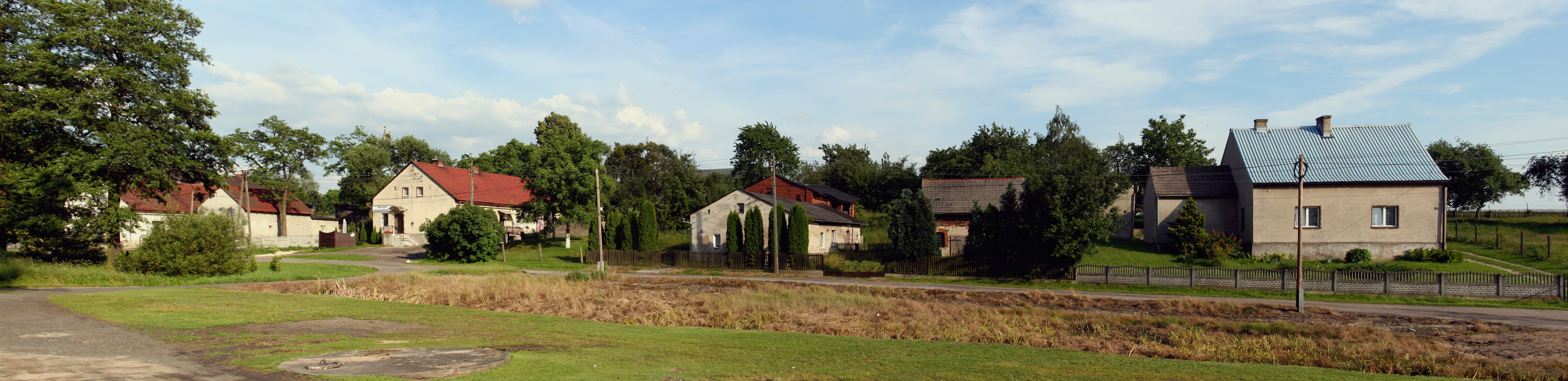 Zacharzowice, fragment wsi, woj. śląskie